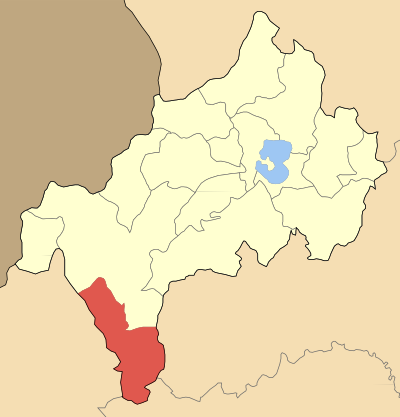 Община Аренес на картата на Ном Костур, Гърция Locator map of Arrenon community (Κοινότητα Αρρενών) at Kastoria perfecture, Greece).